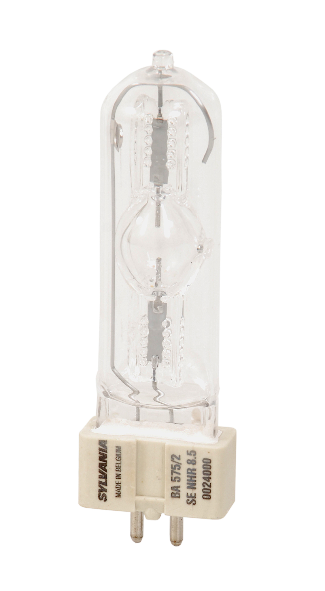 Lampa wyładowcza BA 575W 2 SE D 8500K firmy Sylvania